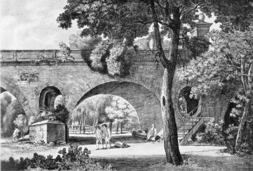 An der Schloßbrücke in Weimar Kolorierter Stich von Georg Melchior Kraus, 1793. Die Sternbrücke ist die Schloßbrücke, die durch eine in einem Pfeiler eingebaute Treppe die Verbindung mit dem "Stern", demältesten Teil des Parks, herstellt.